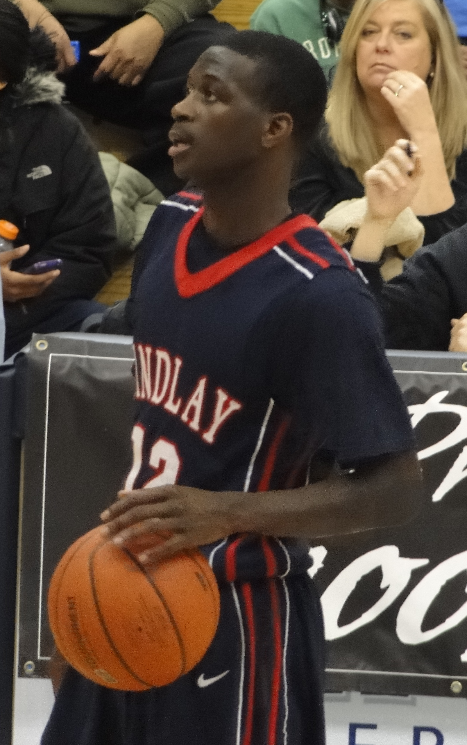 Myck Kabongo